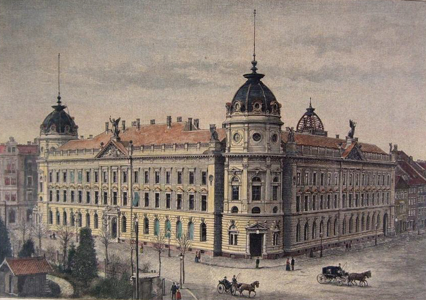 Konstanz, "Das neue Reichspost- und Telegraphengebäude", kolorierter Holzstich, 19. Jahrhundert, ca. 16 x 23 cm